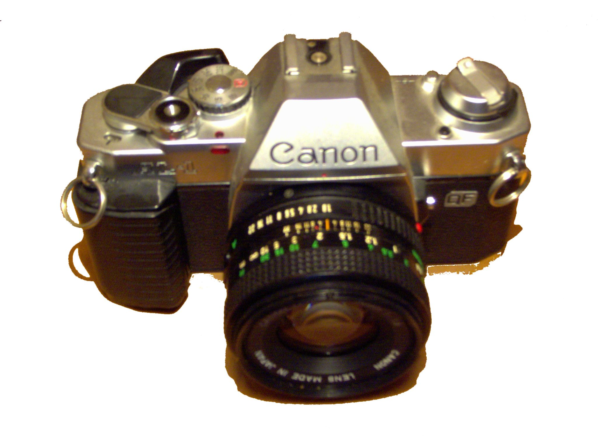 Selbst aufgenommen